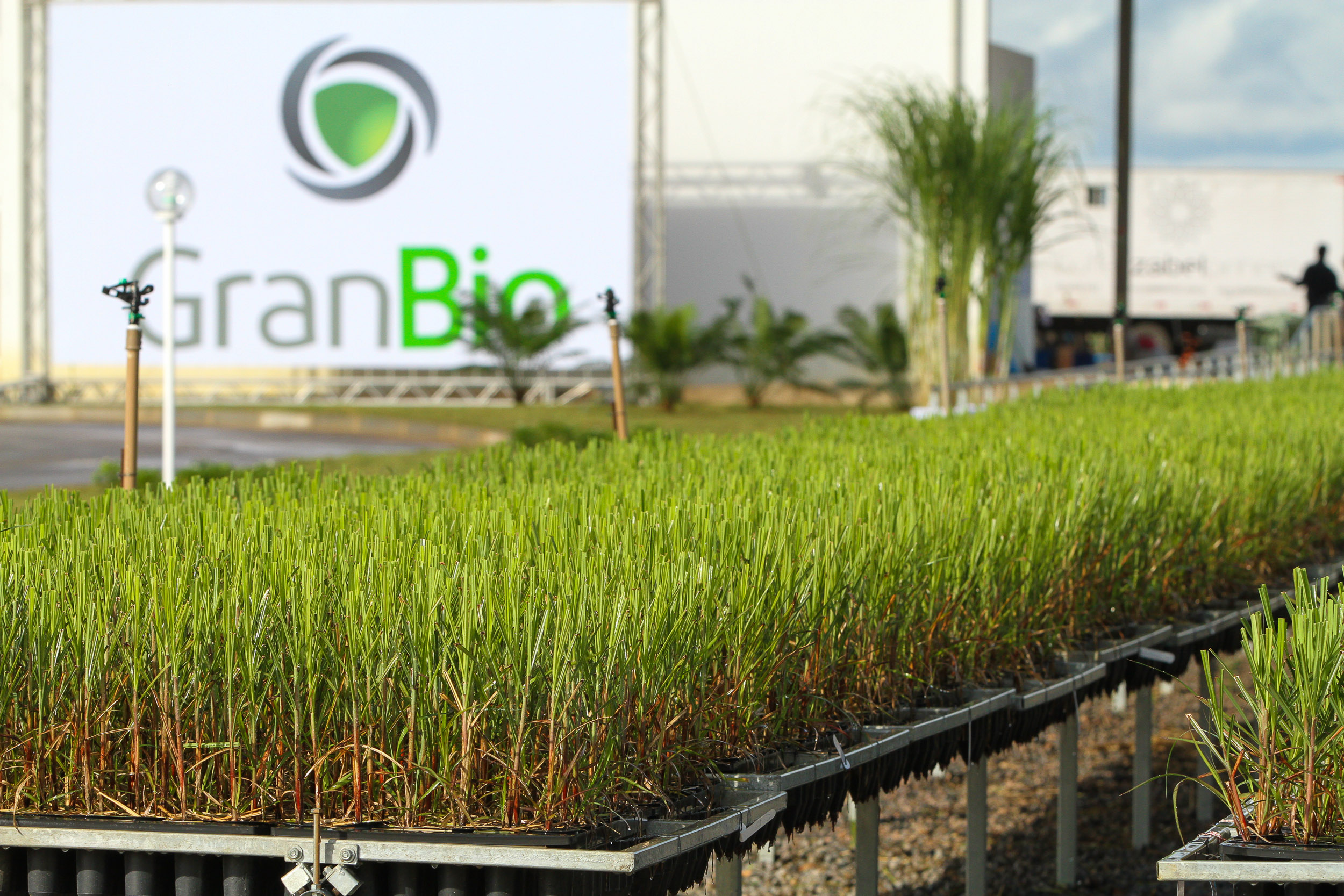 Mudas de cana-energia na Estação Experimental da GranBio, em Alagoas.